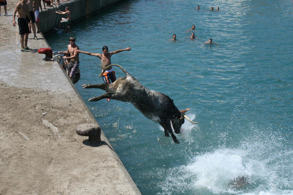 Vaca de la ganaderia Benavent bous a la mar Xabia 2008